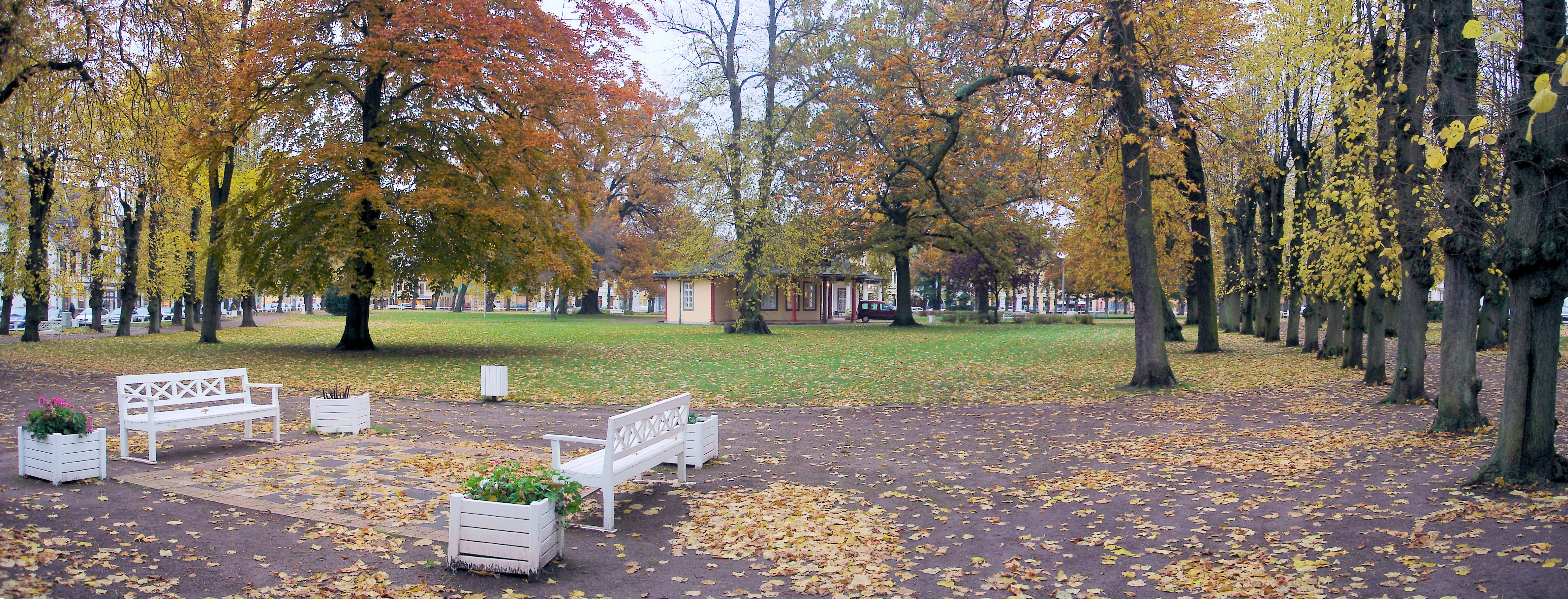 Kamp in Bad Doberan, Landkreis Bad Doberan, Mecklenburg-Vorpommern